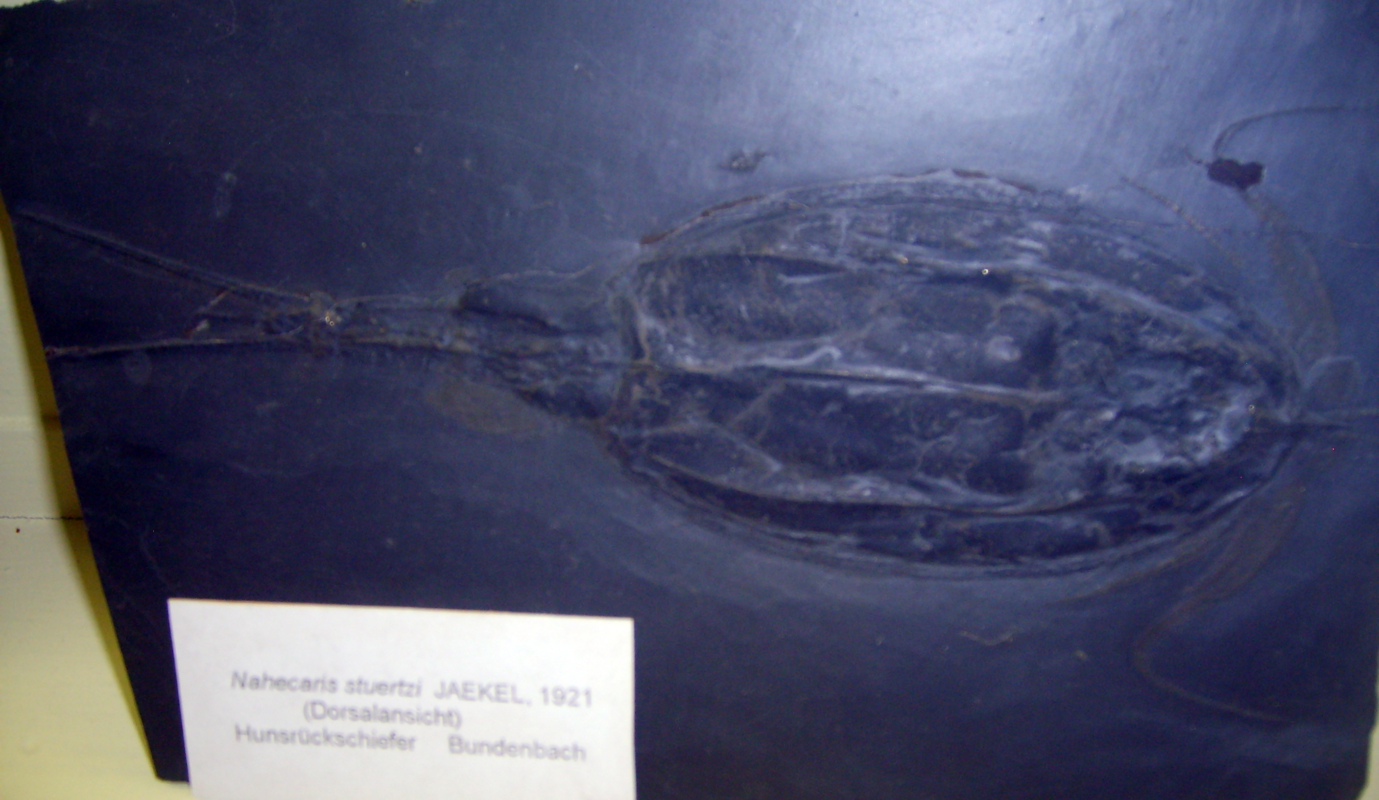 Nahecaris stuertzi at the Museum für Naturkunde, Berlin.